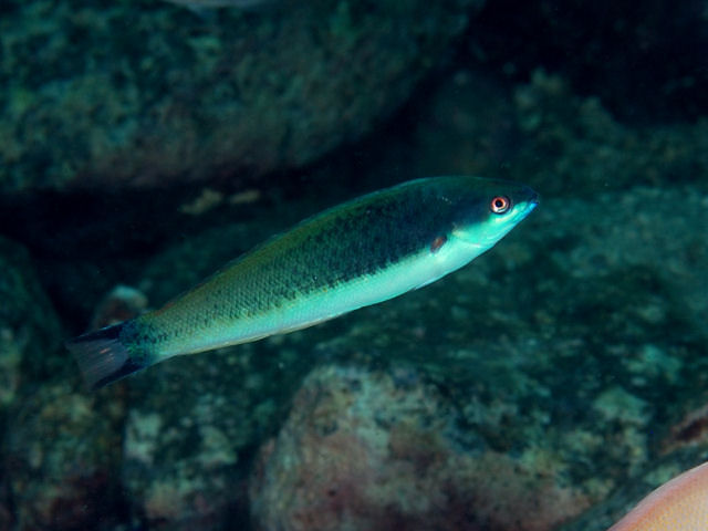 ヤマシロベラ Pseudocoris yamashiroi